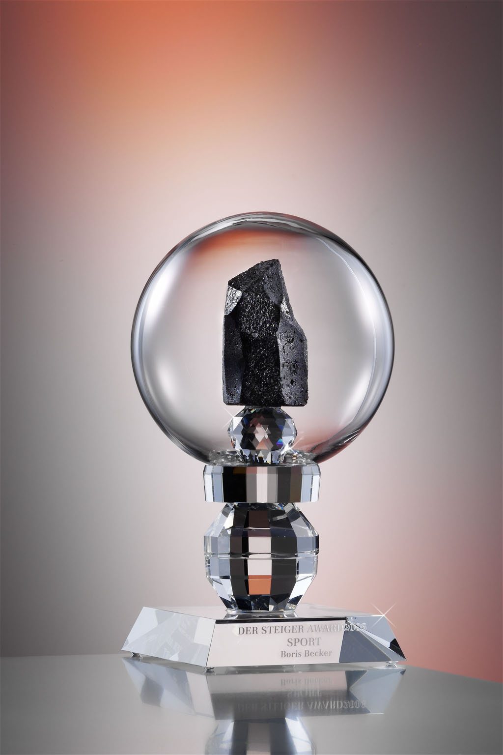 Joska Kristall, Steiger Award 2006, Boris Becker